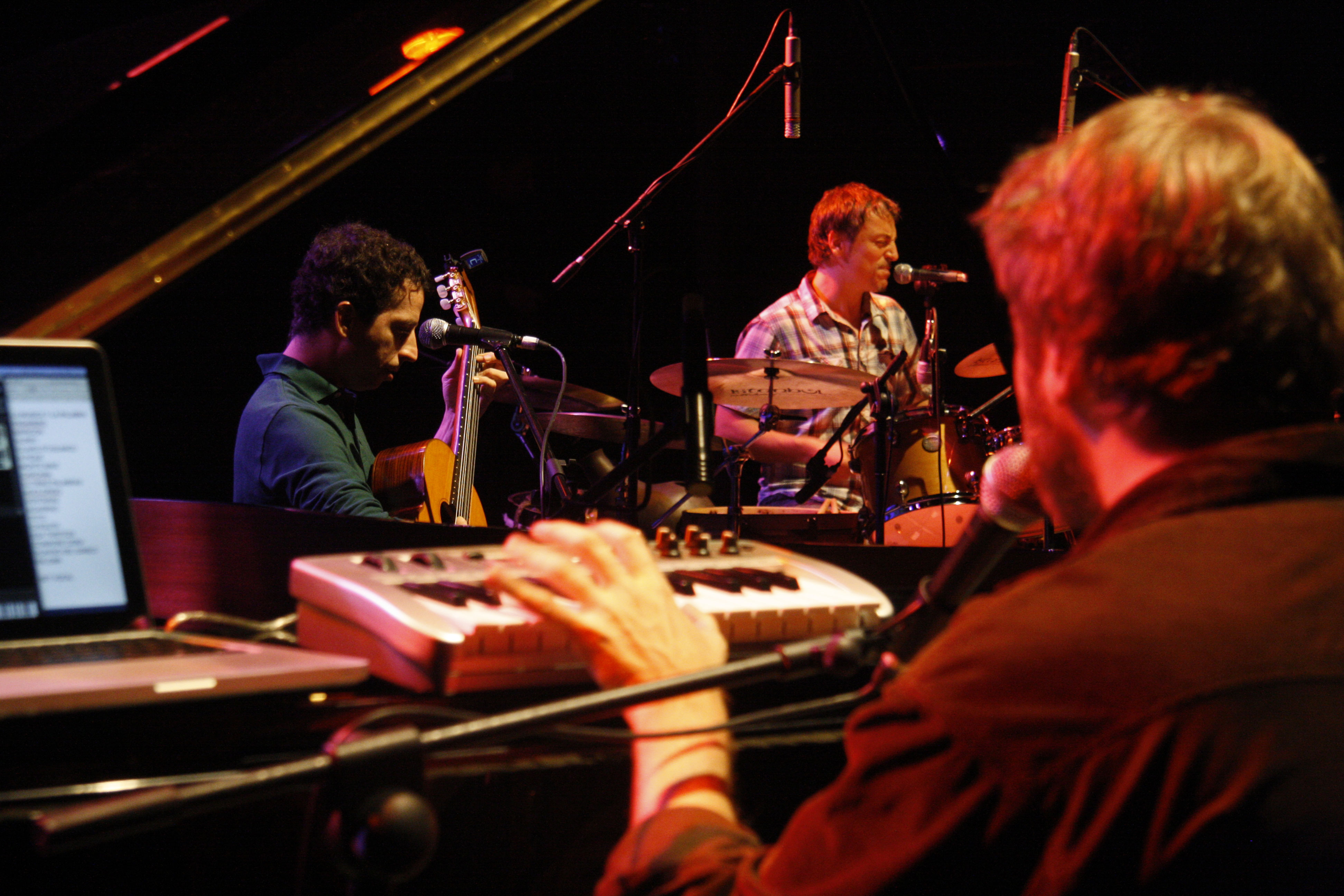 Aca Seca Trío en el 8° Festival Internacional de Jazz de Puerto Montt